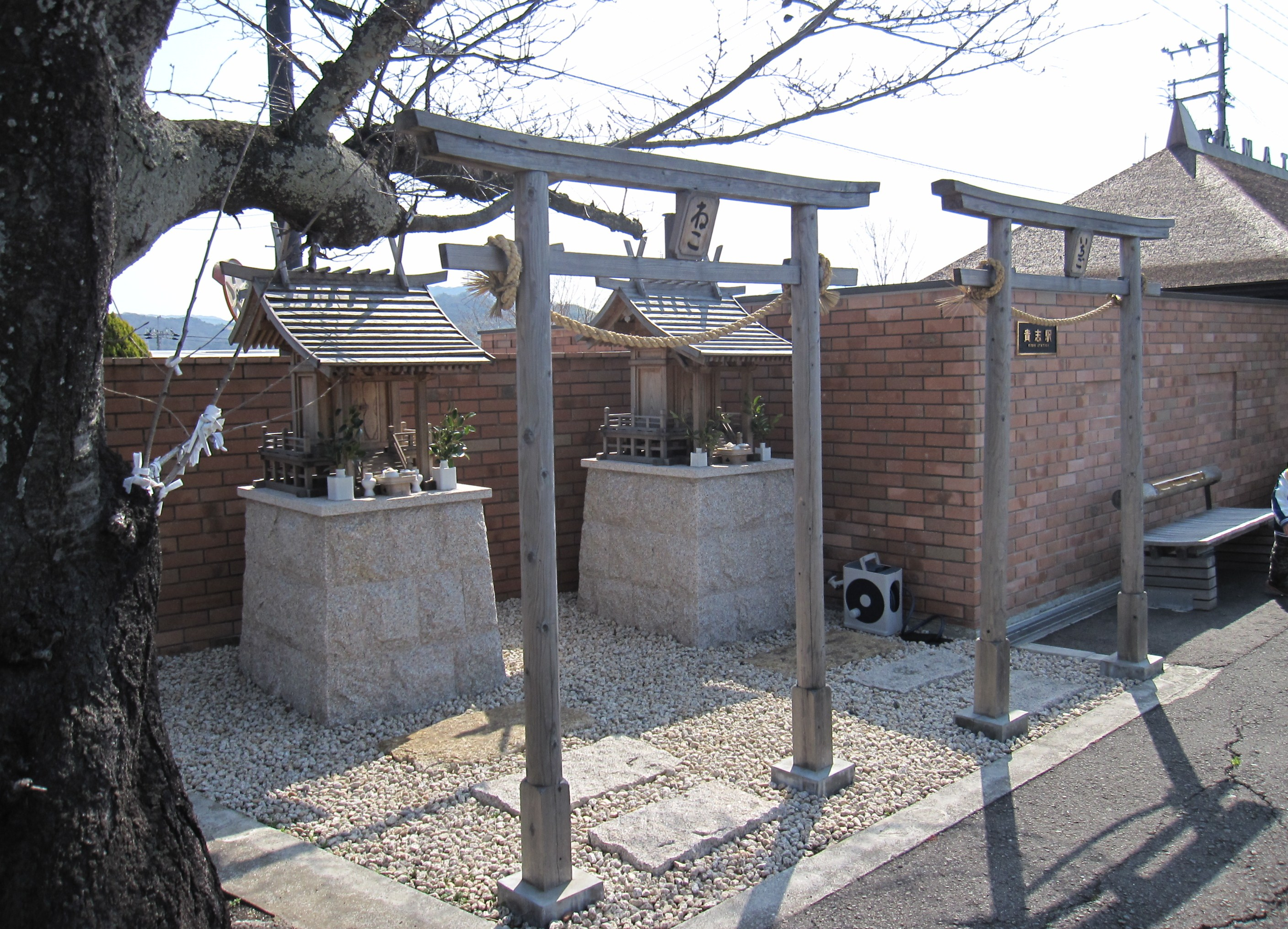 和歌山電鐵貴志駅構内のねこ神社といちご神社